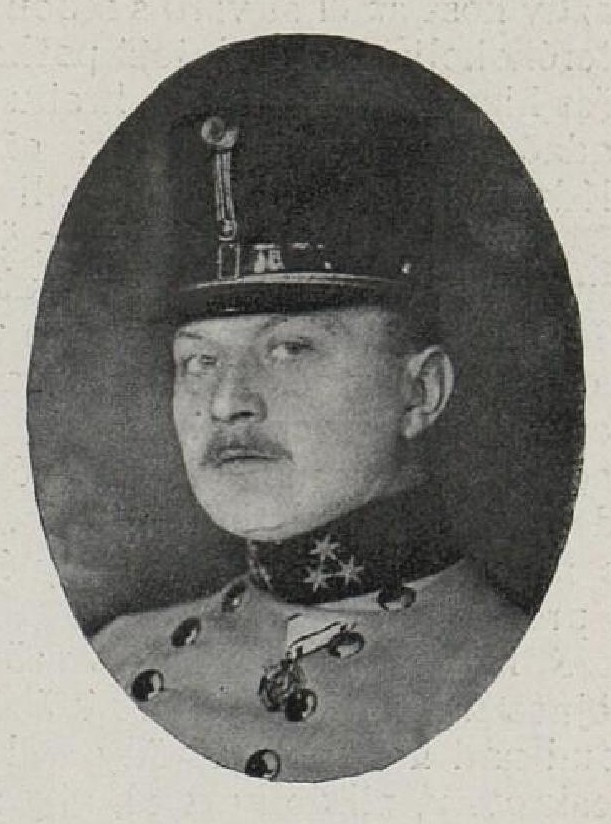 Arnošt Dvořák (1881-1933), český dramatik, divadelní režisér a překladatel